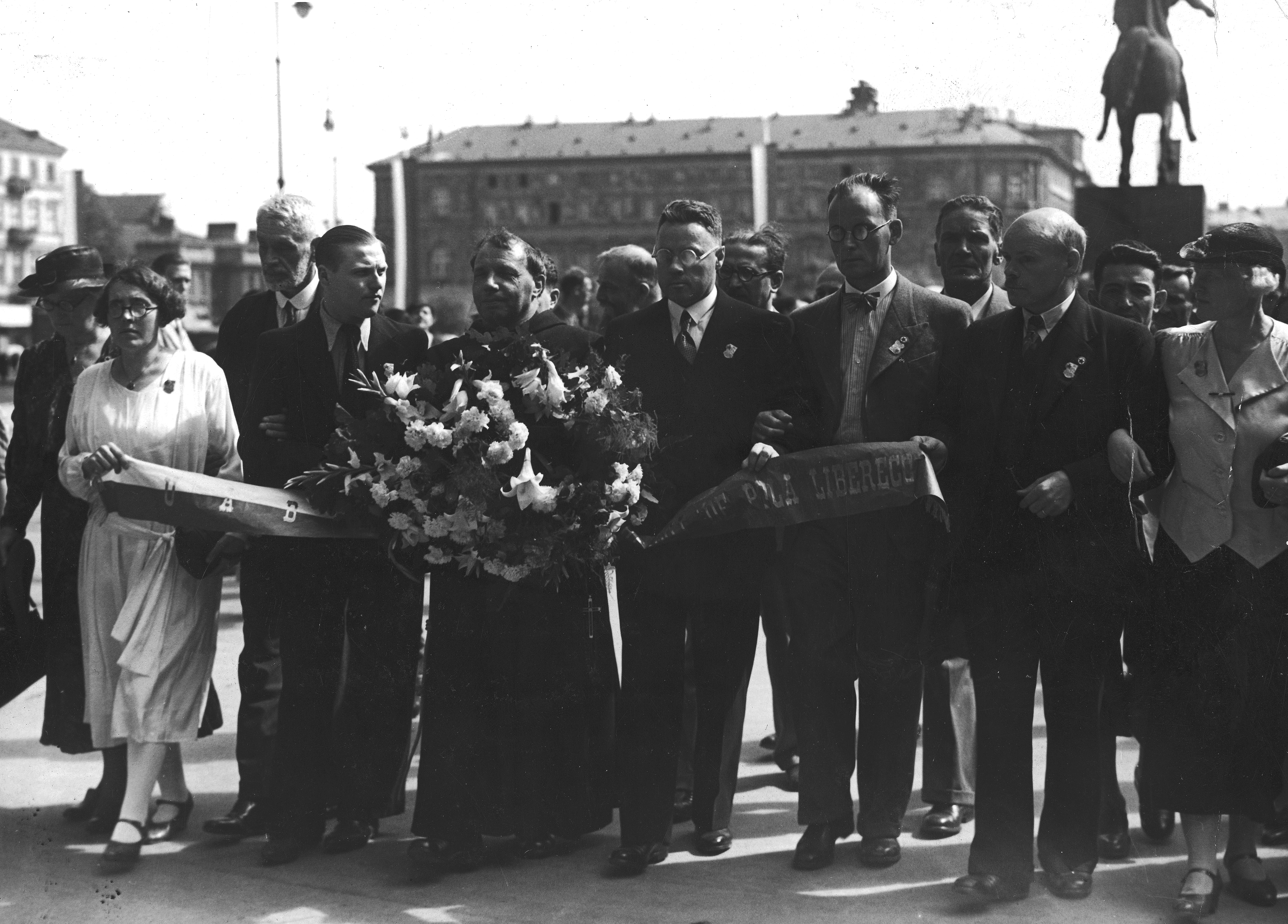 Niewidomi uczestnicy Światowego Kongresu Esperantystów niosą wieniec na Grób Nieznanego Żołnierza. W głębi widoczny pomnik księcia Józefa Poniatowskiego. Warszawa, sierpień 1937